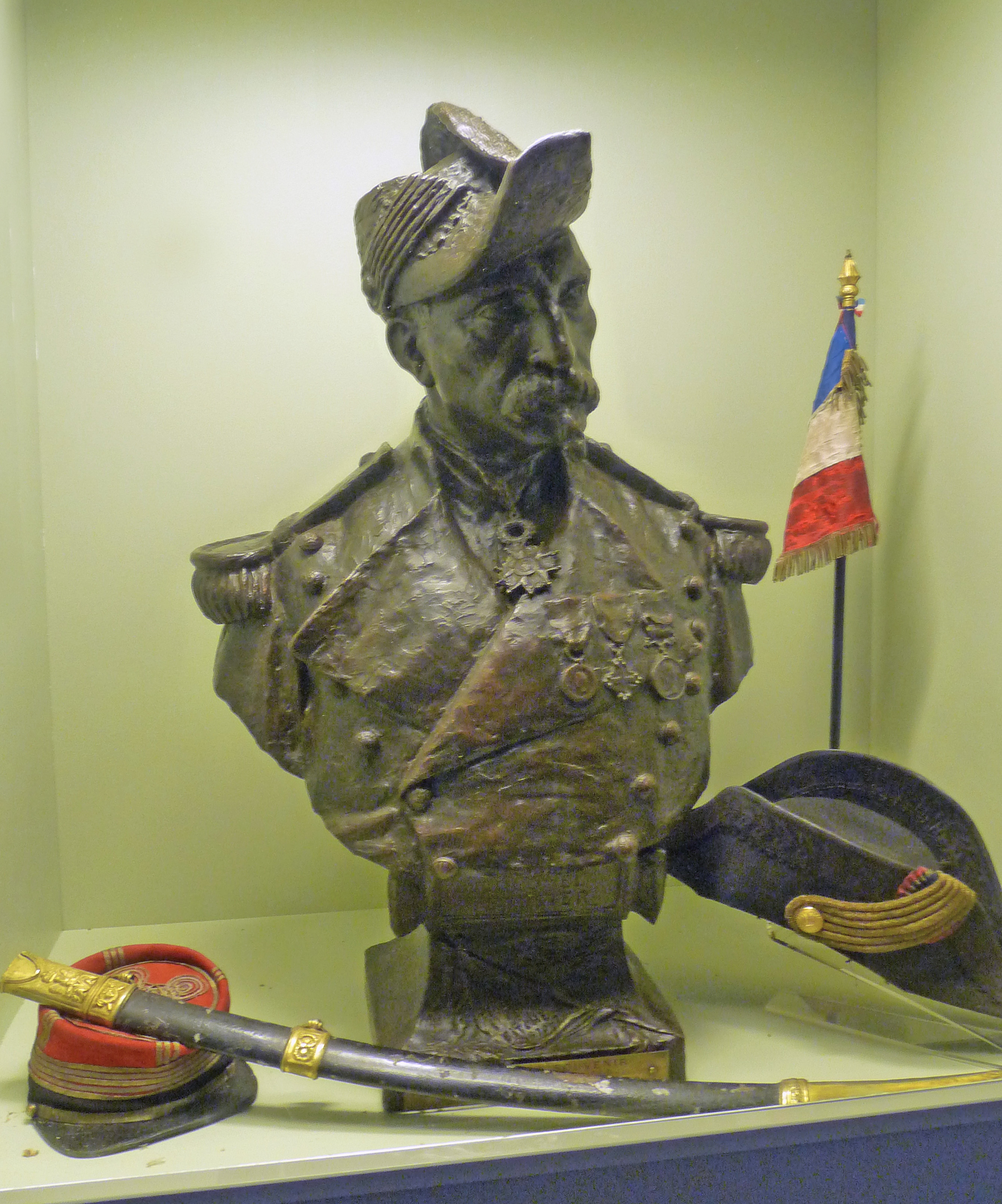 Citadelle de Bitche : buste en fonte (d'après la maquette de Gabriel Puech, 1854-1930) du lieutenant-colonel Teyssier en grand uniforme de l'Etat-Major des Places, qui lui a été offert en 1901 par une souscription publique des "Français de Bitche". Les objets lui ayant appartenu ont été légués en 1977 par son fils, le Docteur Georges Teyssier.